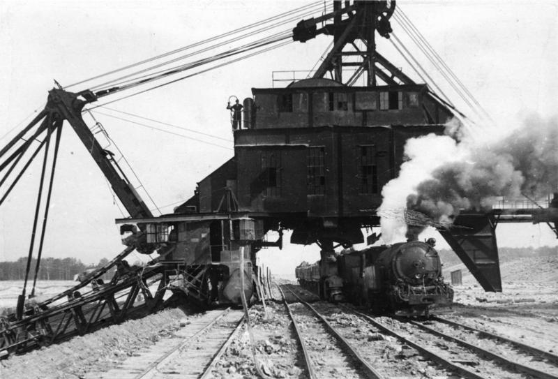 Altenburg, Braunkohletagebau Phoenix Illus-Behm Ausgrabungen im Luckauer Forst bei Altenburg in Thüringen durch die Landesstelle für Vor- und Frühgeschichte. 24.9.49 U.B.z.: Tag und Nacht wühlen im Tagebau der Braunkohlegrube Phoenix bei Altenburg riesige Bagger die Erdschichten von der Braunkohle herunter. Das Fauchen der Grubenlokomotiven, die Signale der Raupenbagger, das metallische Rattern der Greifbagger und Warnläuten der Lorenzüge begleiten als gewaltige Arbeitssinfonien des Zweijahresplans die Ausgrabung der 4000 Jahre alten Grabhügel am Rande der Grube. Zeugen des Steinzeitalters und des Maschinenzeitalters stehen sich gegenüber. Die Vergangenheit muß der Gegenwart und ihren Bedürfnissen weichen. 4011-49